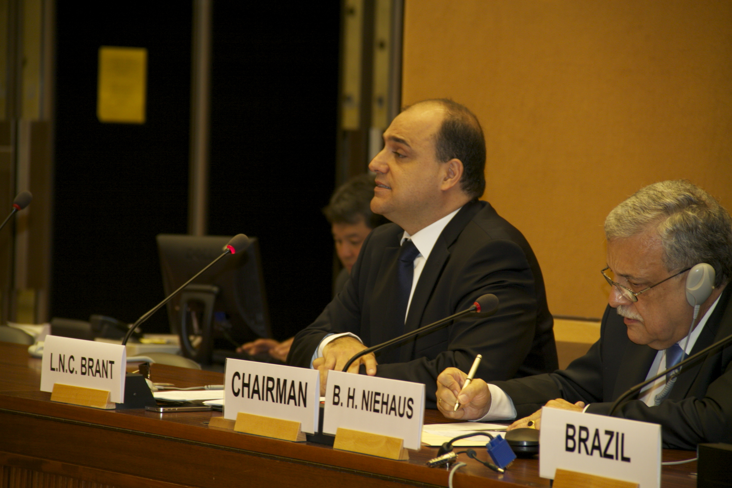 Comissão brasileira na ONU.